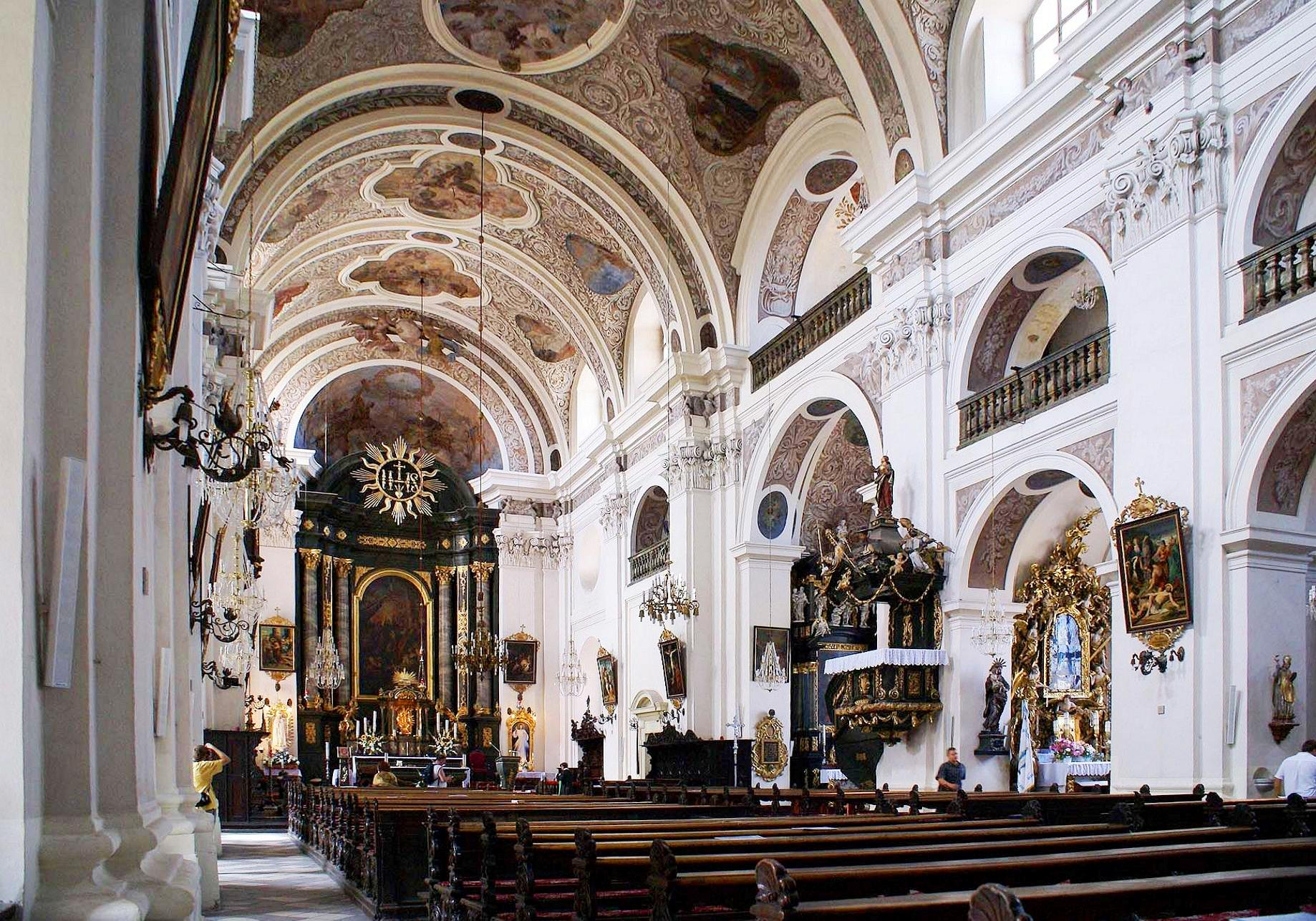 Ottmachau, St. Nikolaus und Franz Xaver